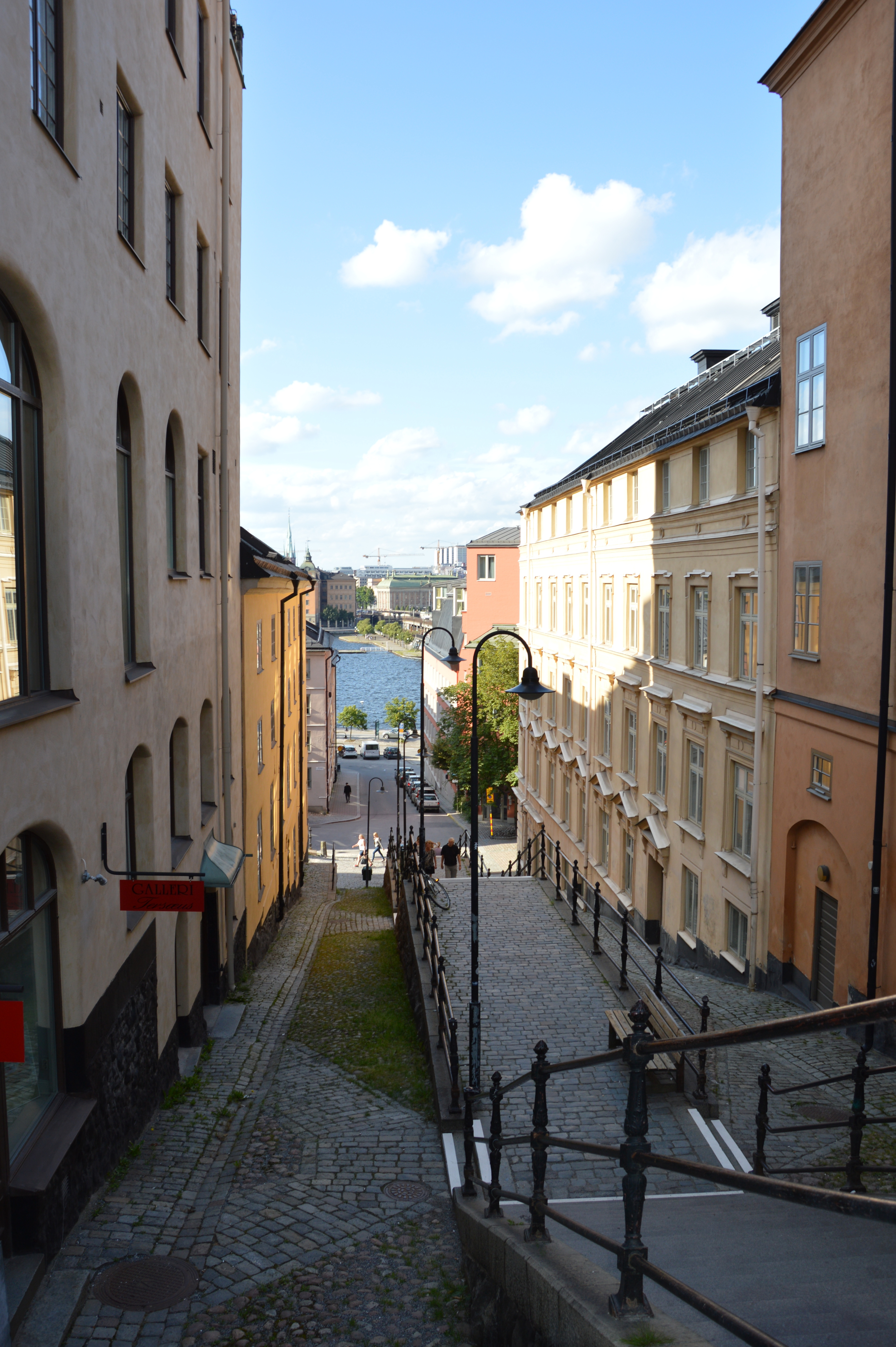 Pustegränd